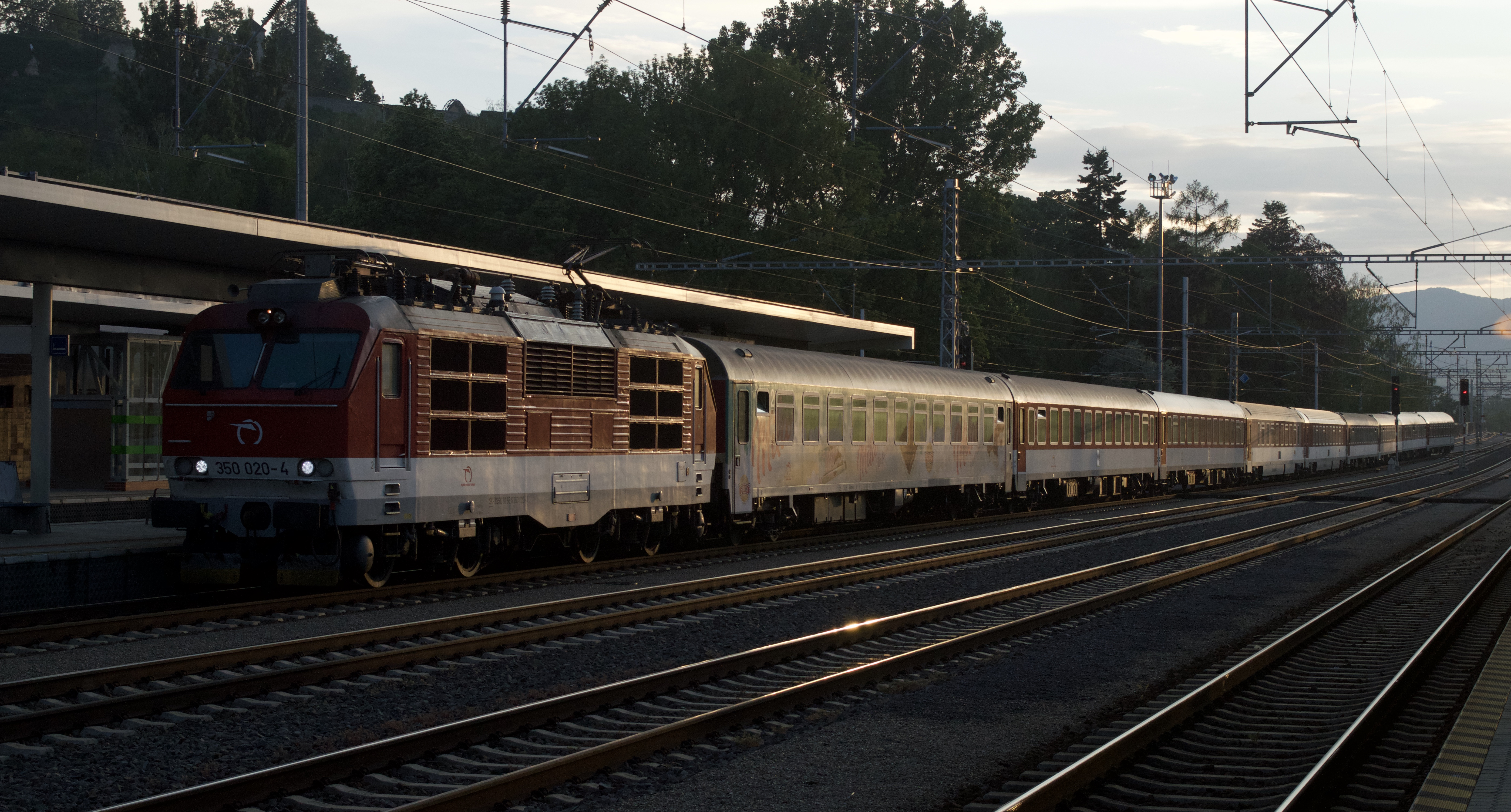 Moving onto Slovakia from the Czech Republic via the border crossing at Vlárský průsmyk saw me finish my day's travels at Trenčín. Seen here is Železničná spoločnosť Slovensko (Slovakian Railways) electric loco 350020 on a late running train R613 "Ružín", 18:03 Bratislava hl.st. to Košice on 12 May 2018.